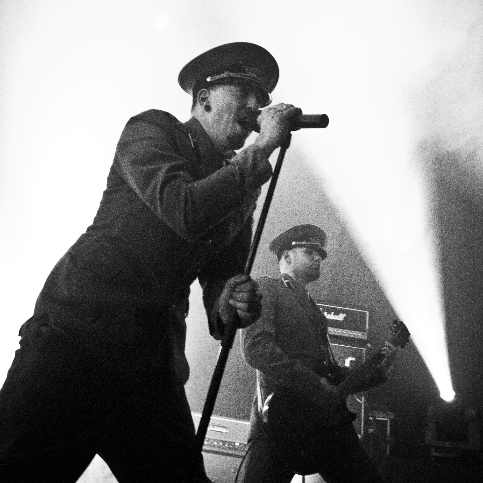 Drottnar au Elements of Rock 2013